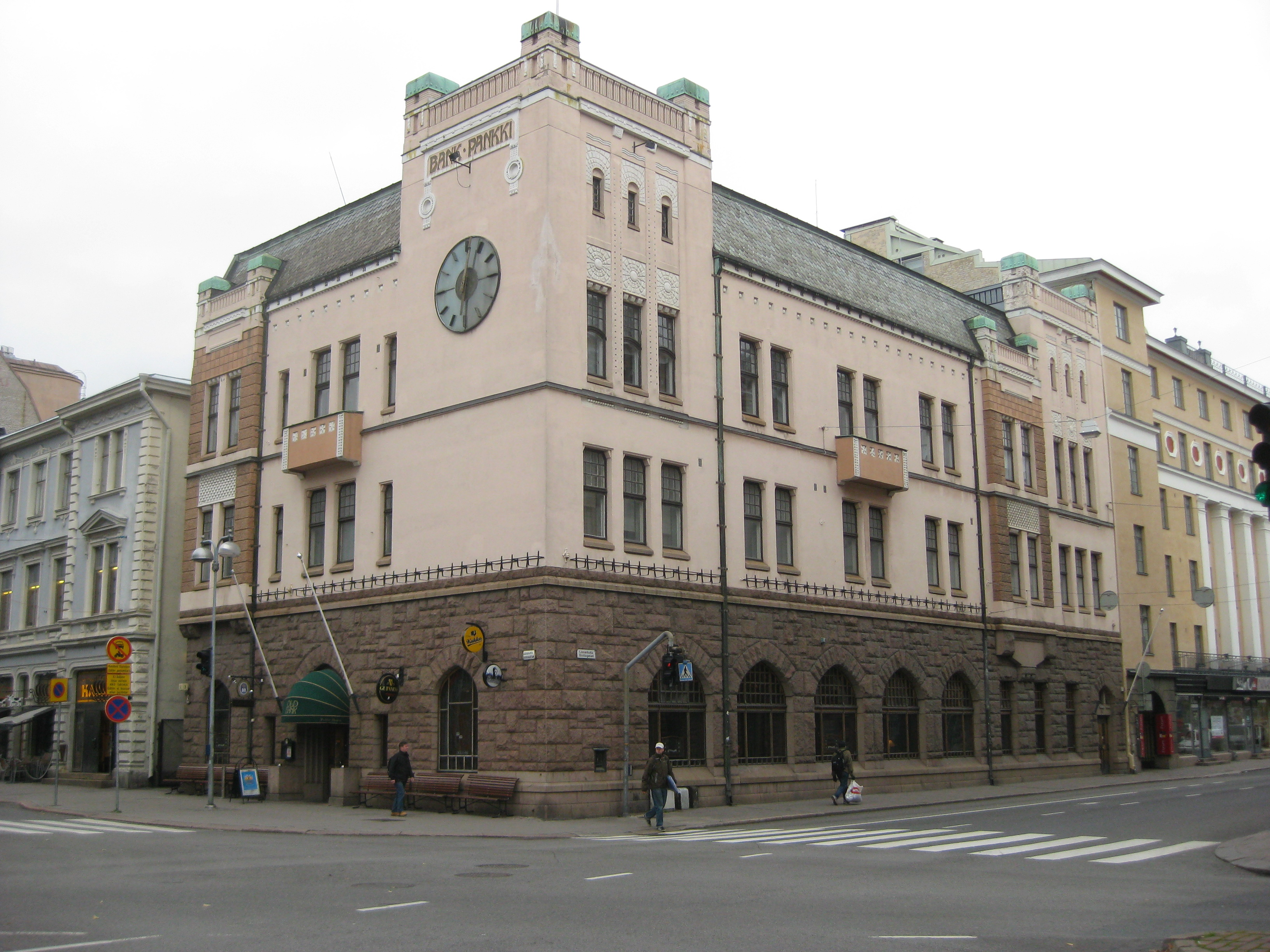 Frithiof Strandells planerade Åbo Aktiebank i hörnet av Slottsgatan och Auragatan, Åbo.